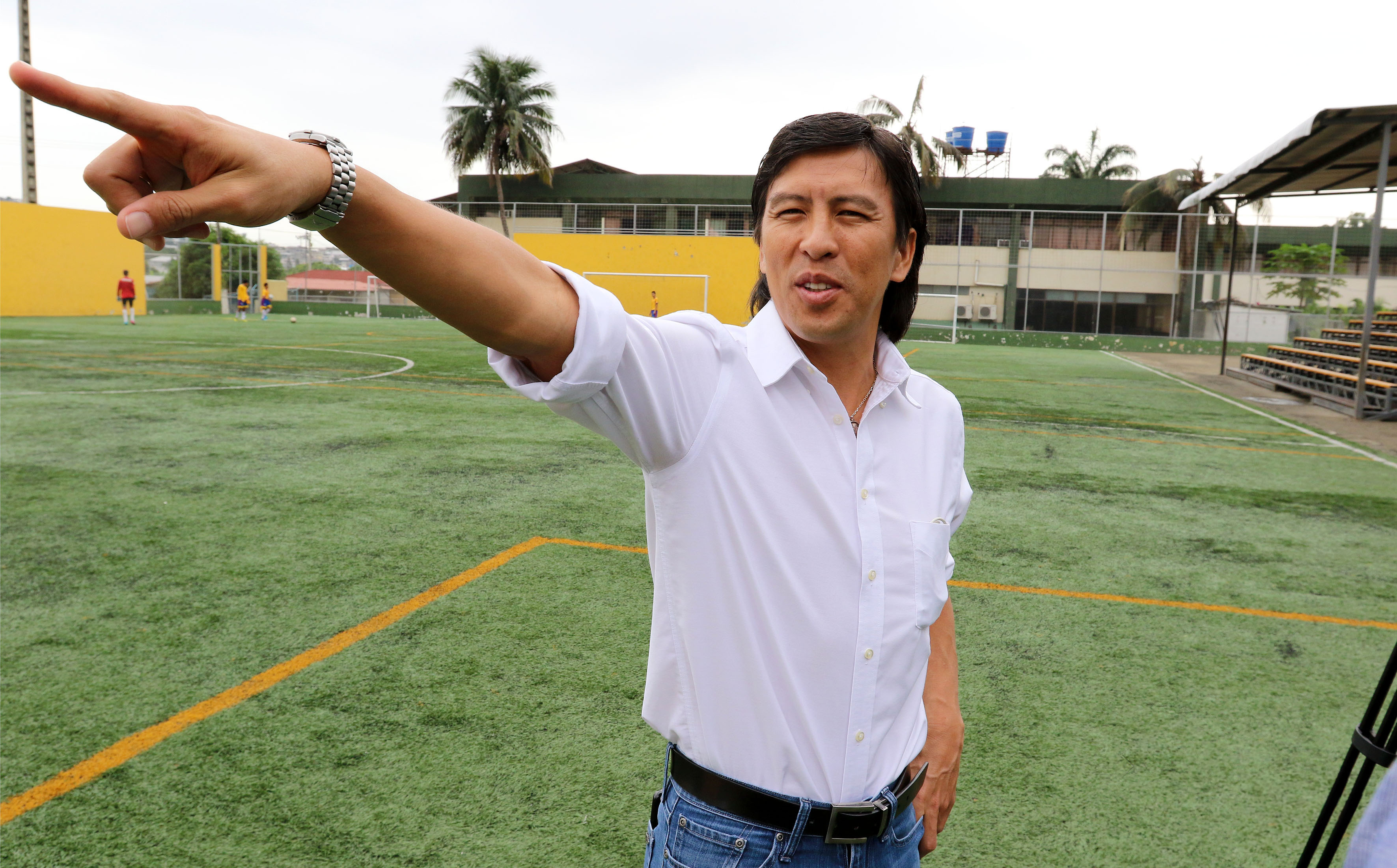 Guayaquil 17 de marzo del 2016 (Andes).-Luis "chino" Gómez centrocampista de la selección ecuatoriana de fútbol, habló sobre los partidos que Ecuador enfrentará contra Paraguay y Colombia por la eliminatorias. Foto:Andes/César Muñoz